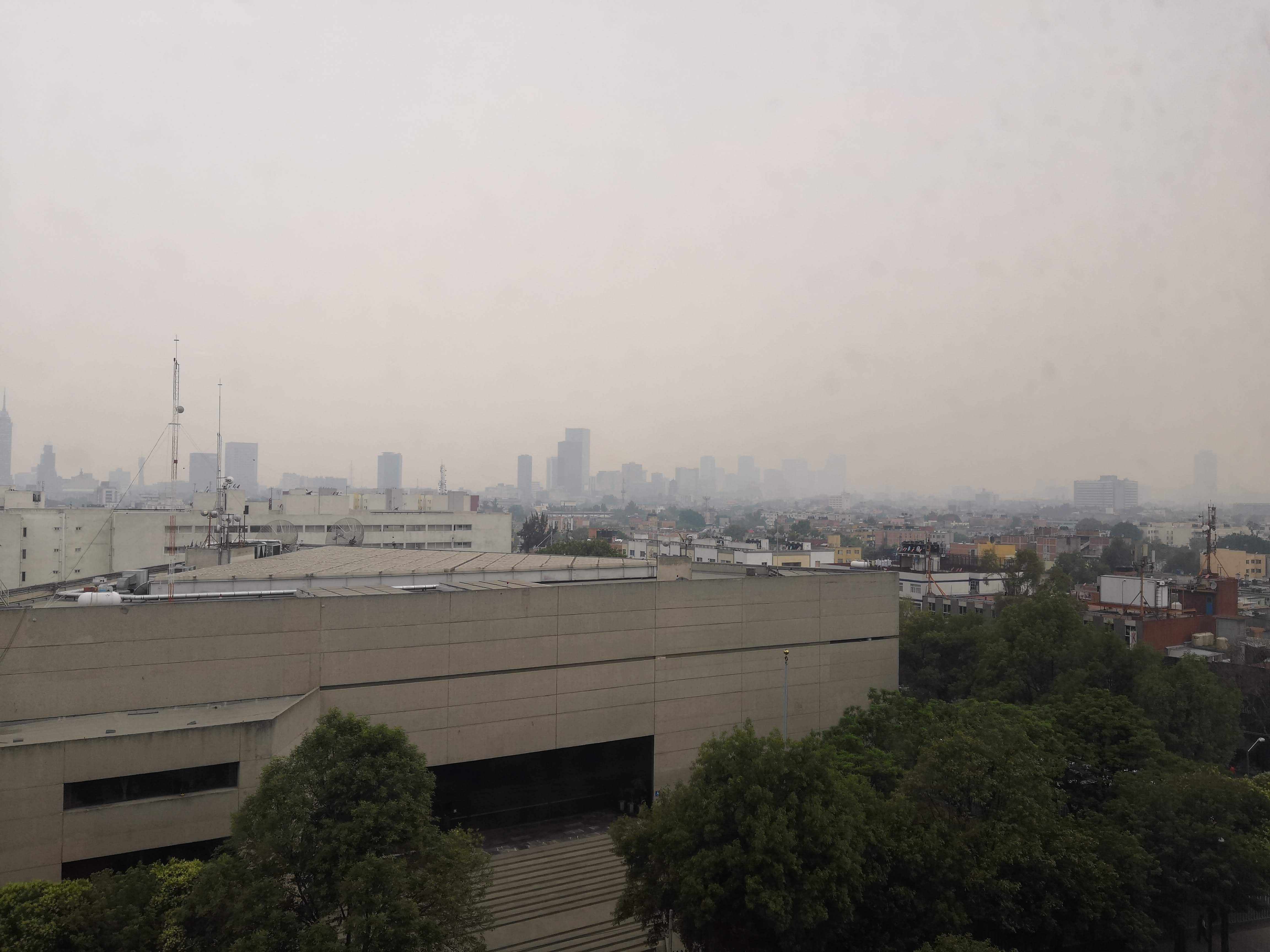 Cielo contaminado en CDMX